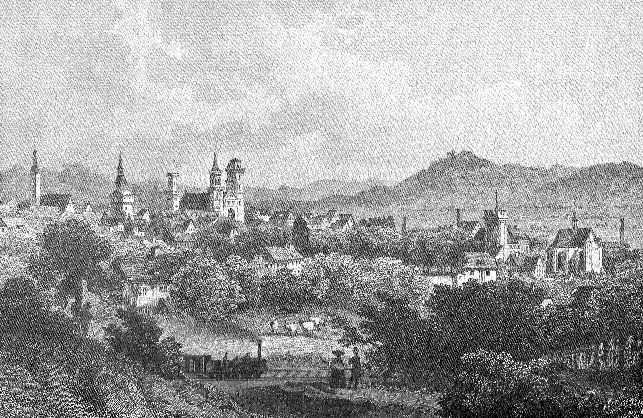 Historische Ansicht von Zittau in Sachsen. Stahlstich.